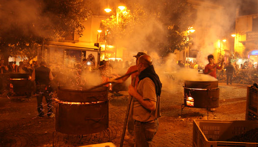 Sagra della Varola a Melfi